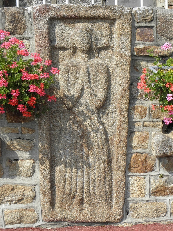 Dalle funéraire encastrée dans le mur de soutènement du cimetière de Juilley (50).